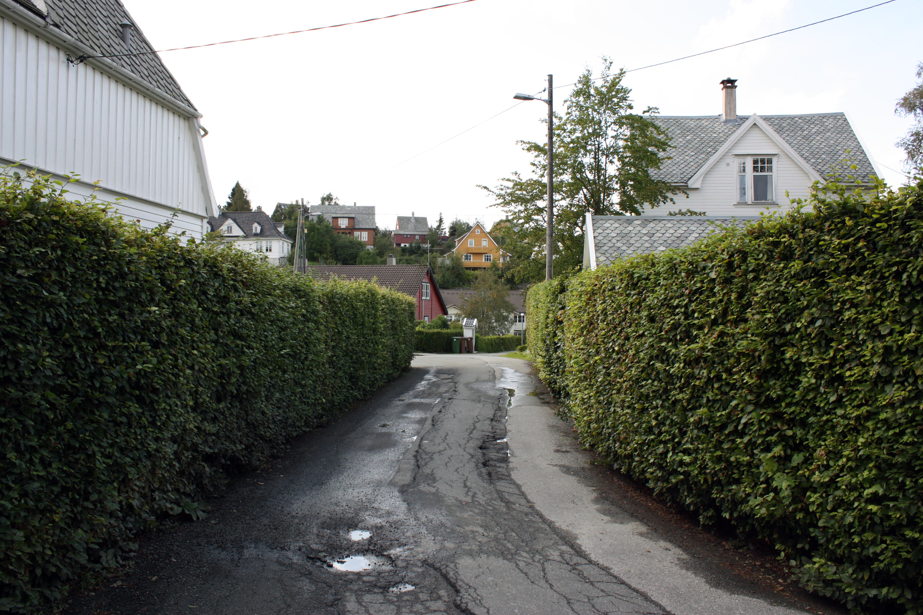 Stasjonsvegen, Fana, Bergen.